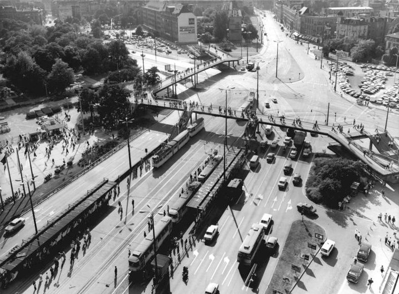 Leipzig, Friedrich-Engels-Platz, Fußgängerbrücke ADN-ZB Raphael Leipzig: Blick auf den Friedrich-Engels-Platz mit Fußgängerbrücke.